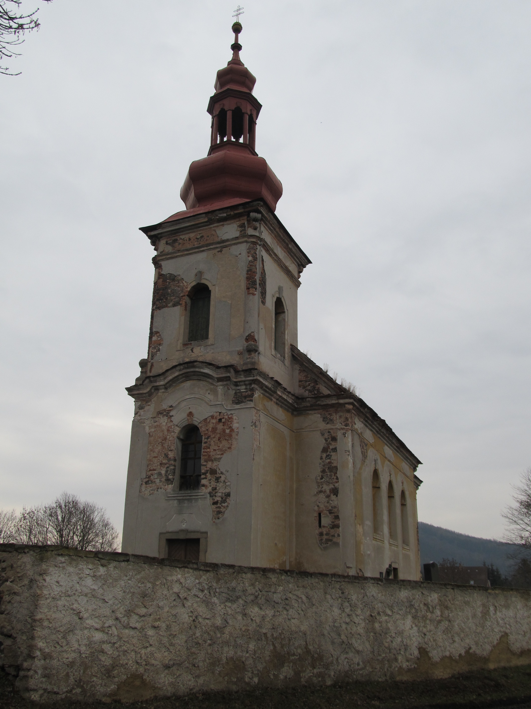 Skytaly - kostel svaté Markéty